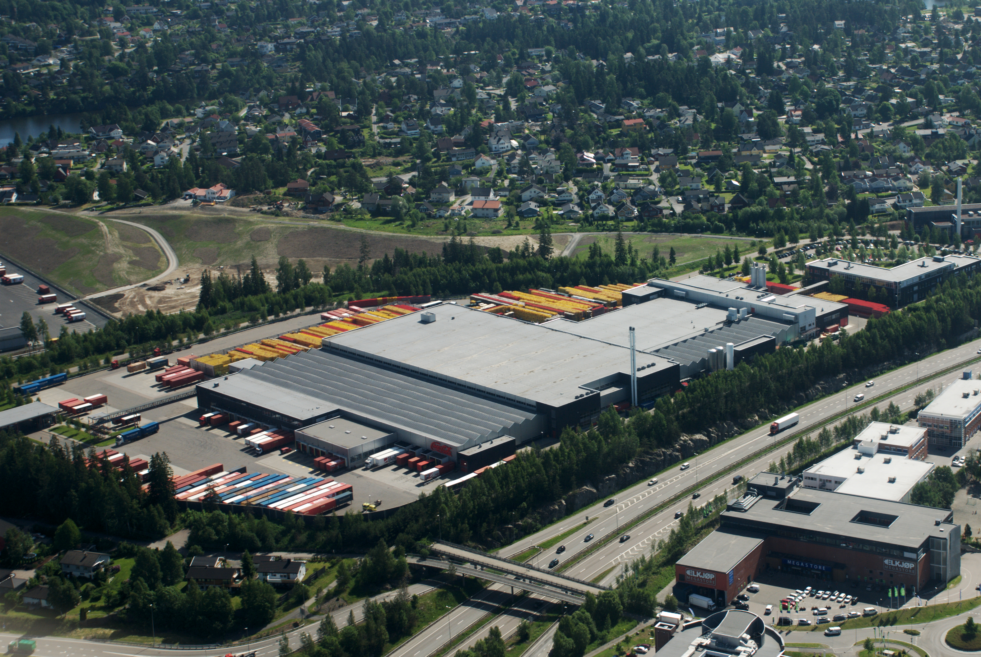 Coca-Cola Drikker på Robsrud i Lørenskog, rett over kommunegrensa til Oslo. Riksvei 159 midt i bildet, boligområde på Kjenn i bakgrunnen.